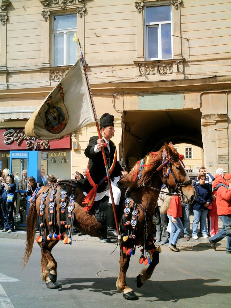 Junii Braşovecheni - stegarul